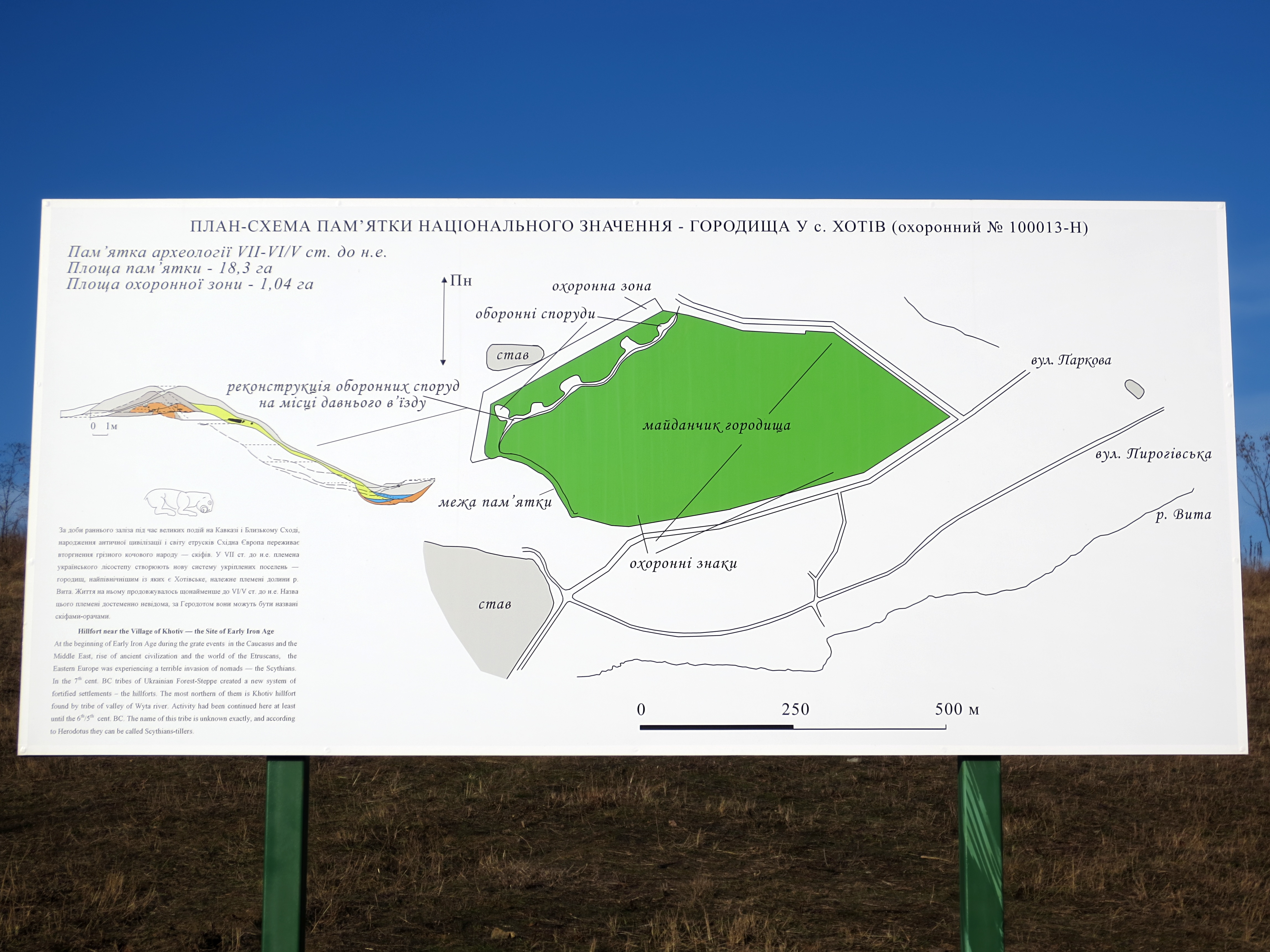 Хотівське городище. Південно-західна частина, біля дороги ("вулиці Паркової"). Інформаційне табло.